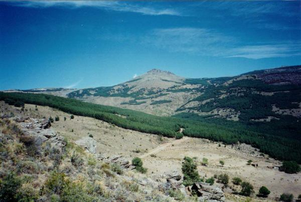 Pico del Almirez (2.519 msnm), en la Sierra Nevada almeriense, desde su vertiente sur.